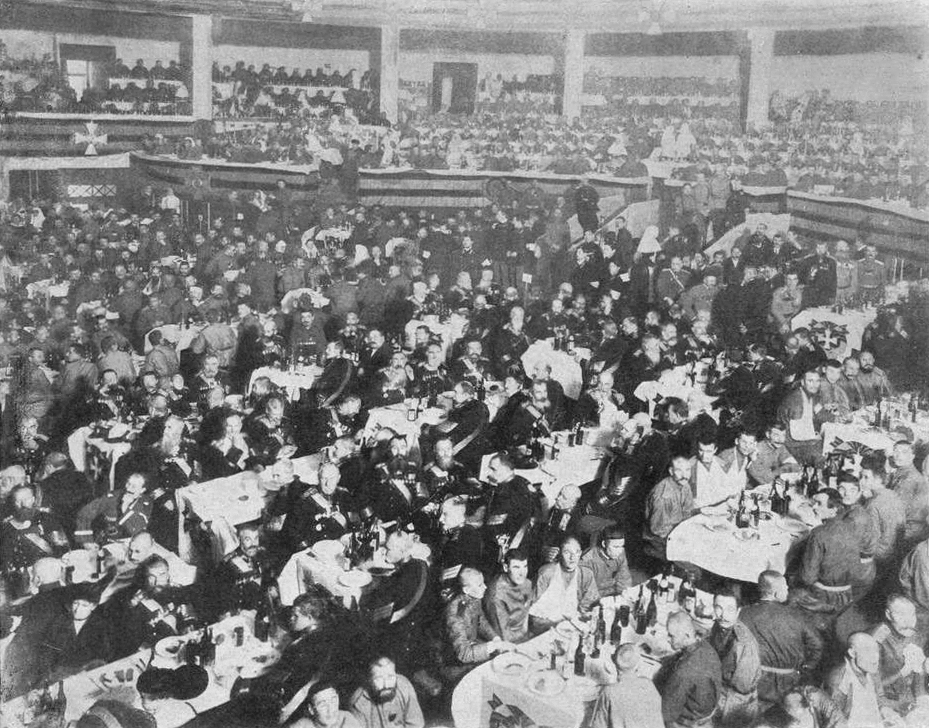 Обед георгиевских кавалеров 26 ноября в Петрограде, в народном доме императора Николая II. На празднике присутствовало 16 000 георгиевских кавалеров.